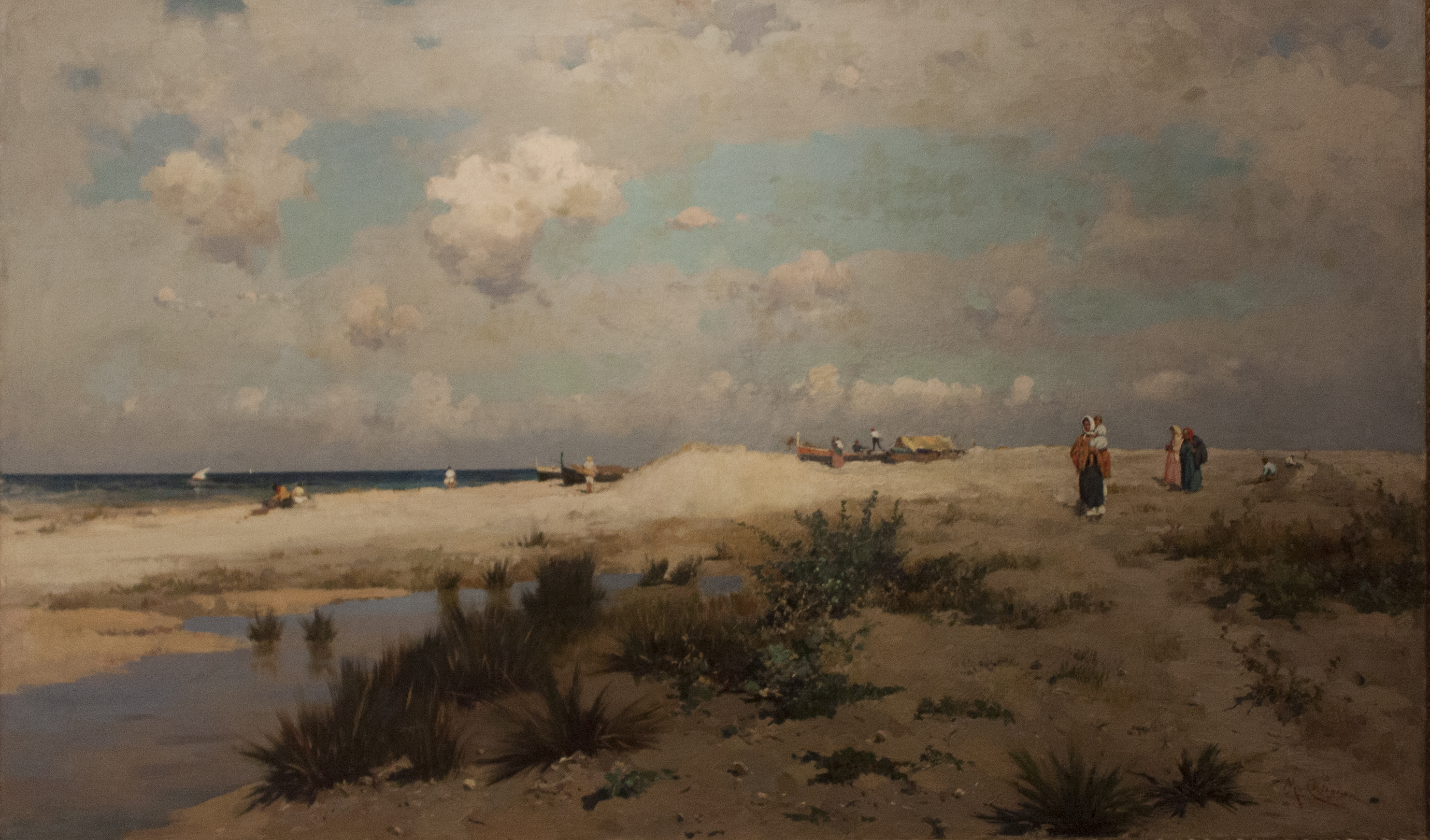 Isola delle Femmine - Michele Cortegiani olio su tela 1884 ca